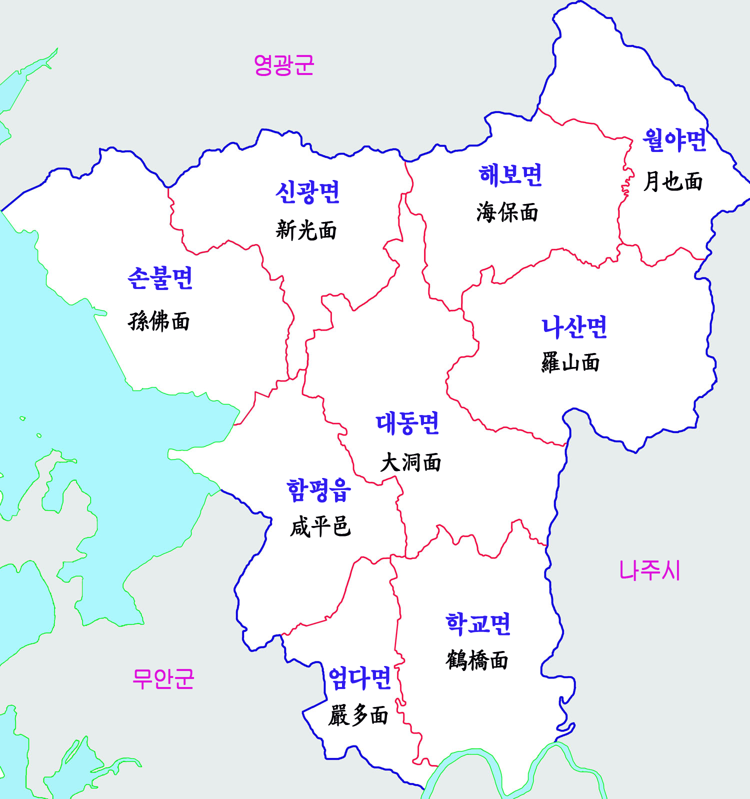 함평군 행정지도